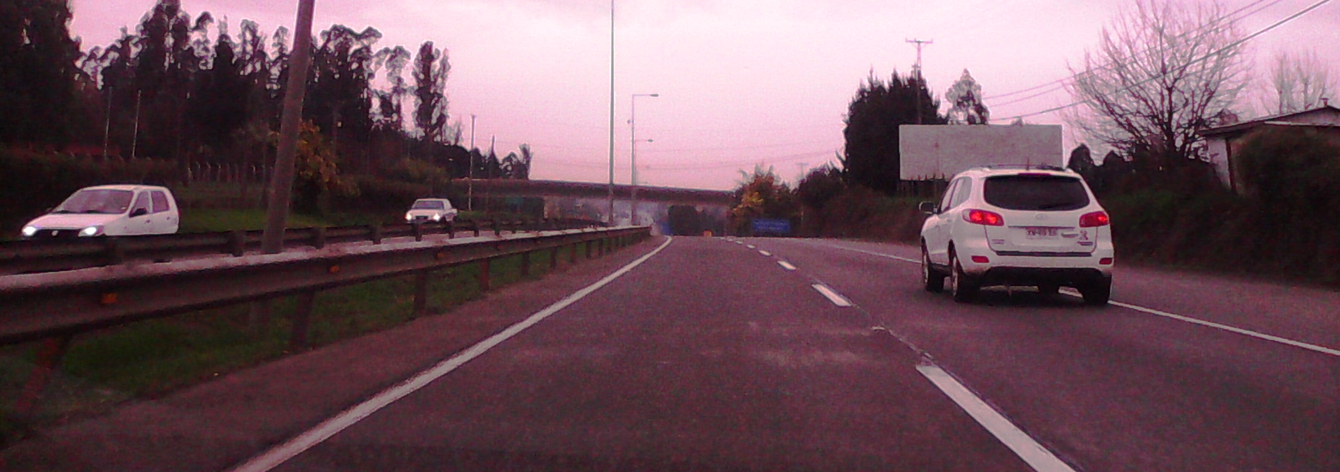 Ruta de La Araucanía (Ruta 5 de Chile) a la altura de Quepe. Vista hacia el norte.